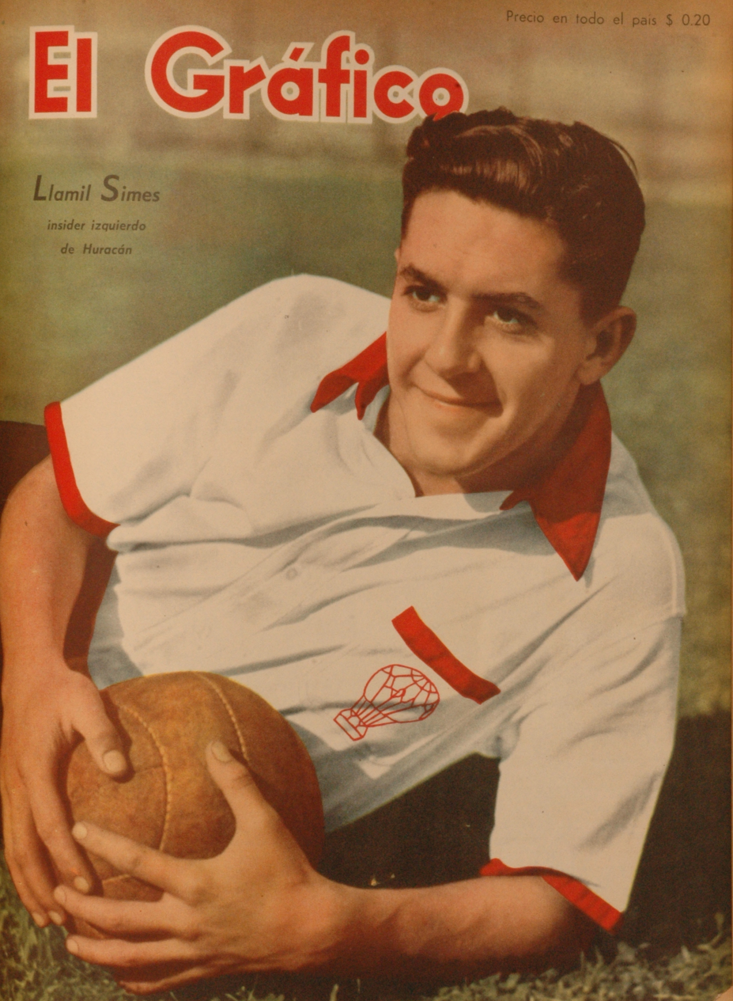 El Grafico del 12 de Octubre de 1945. Edicion 1370